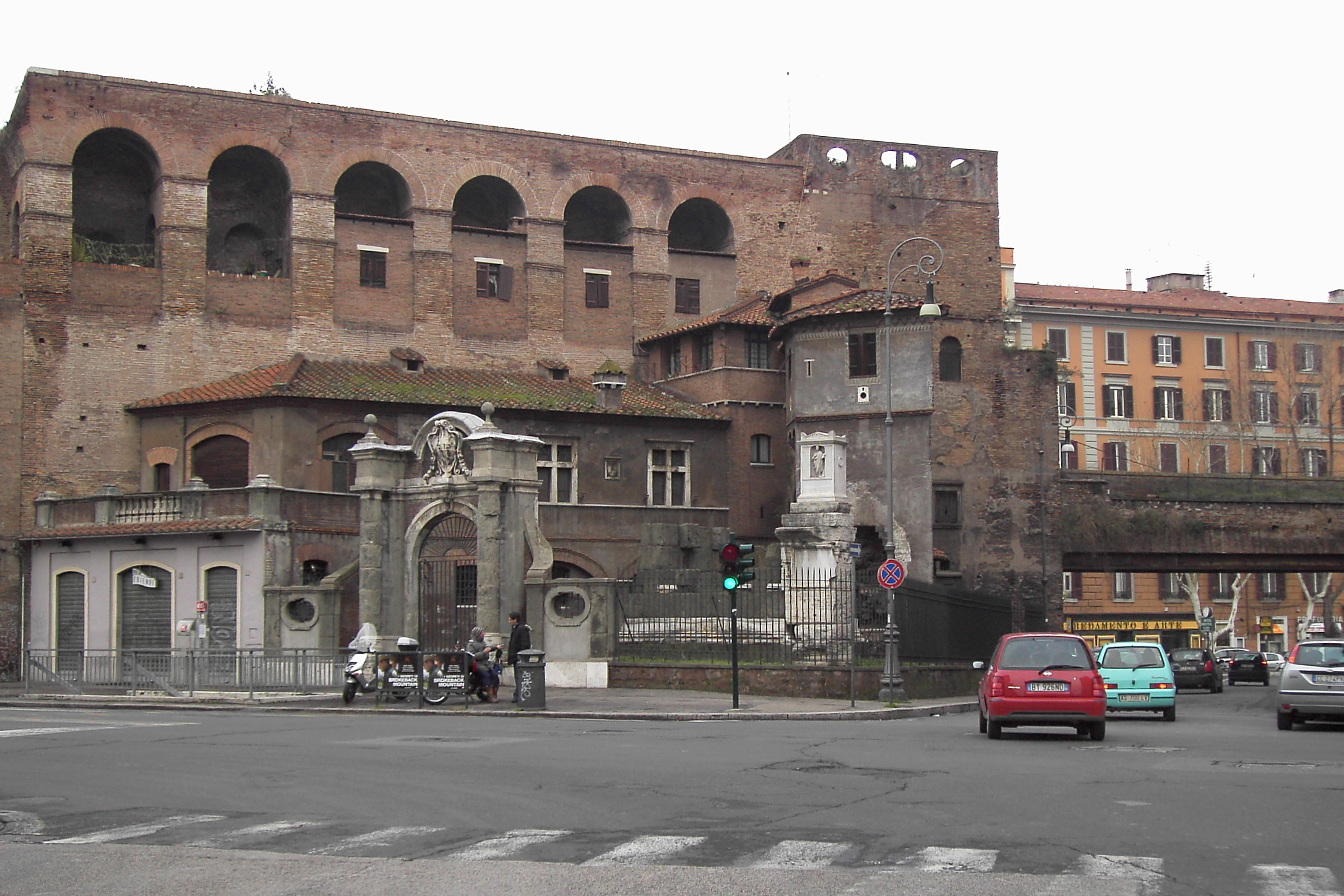 Ancient Porta Salaria in Rome, Piazza Fiume